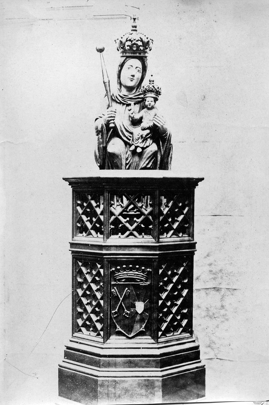 Photo de la statue de Notre-Dame de la Treille à Lille (fin 19e siècle).